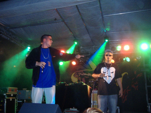 Godsilla und Amir; Konzertfoto